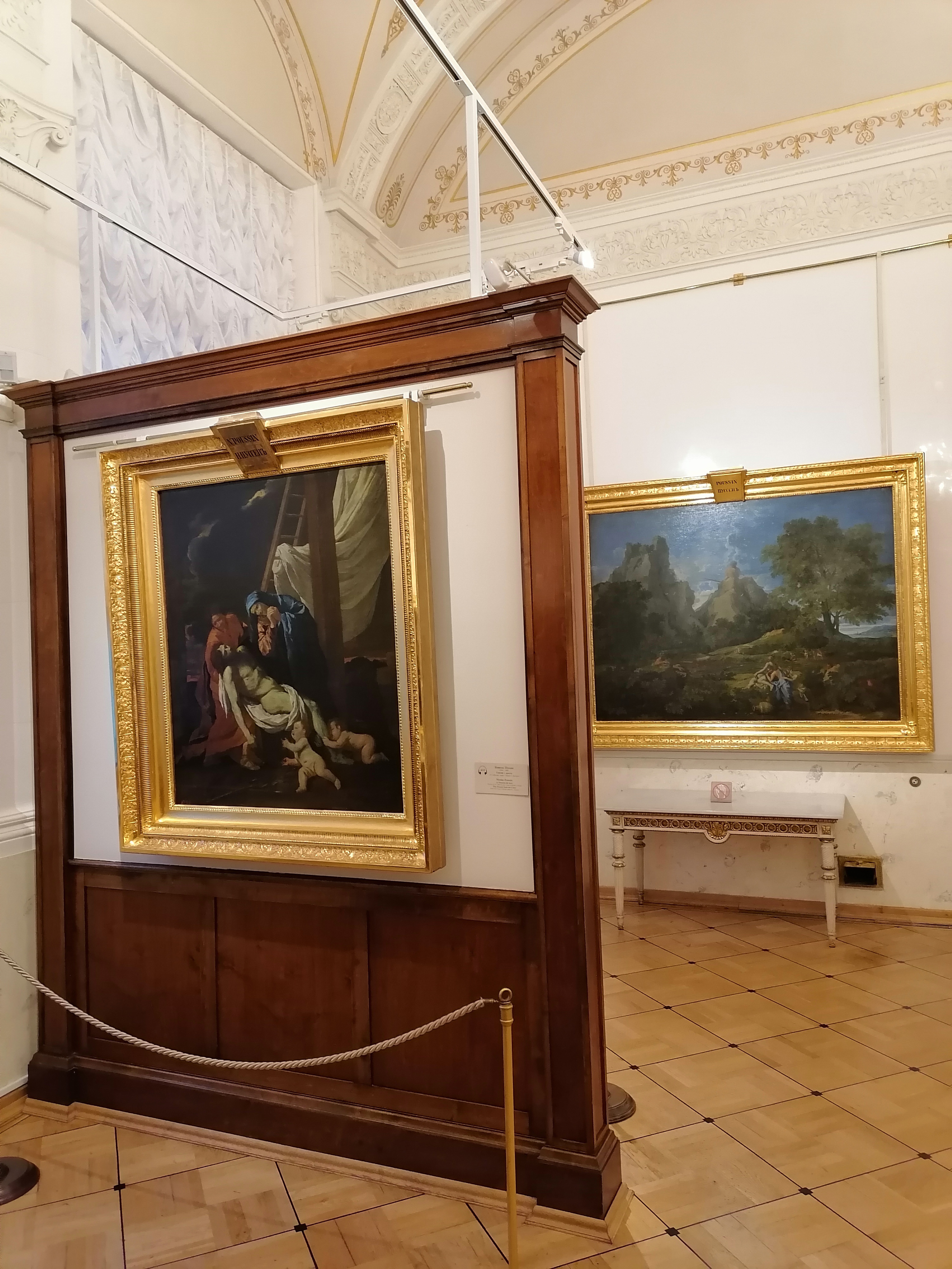 Зимний дворец - зал 279